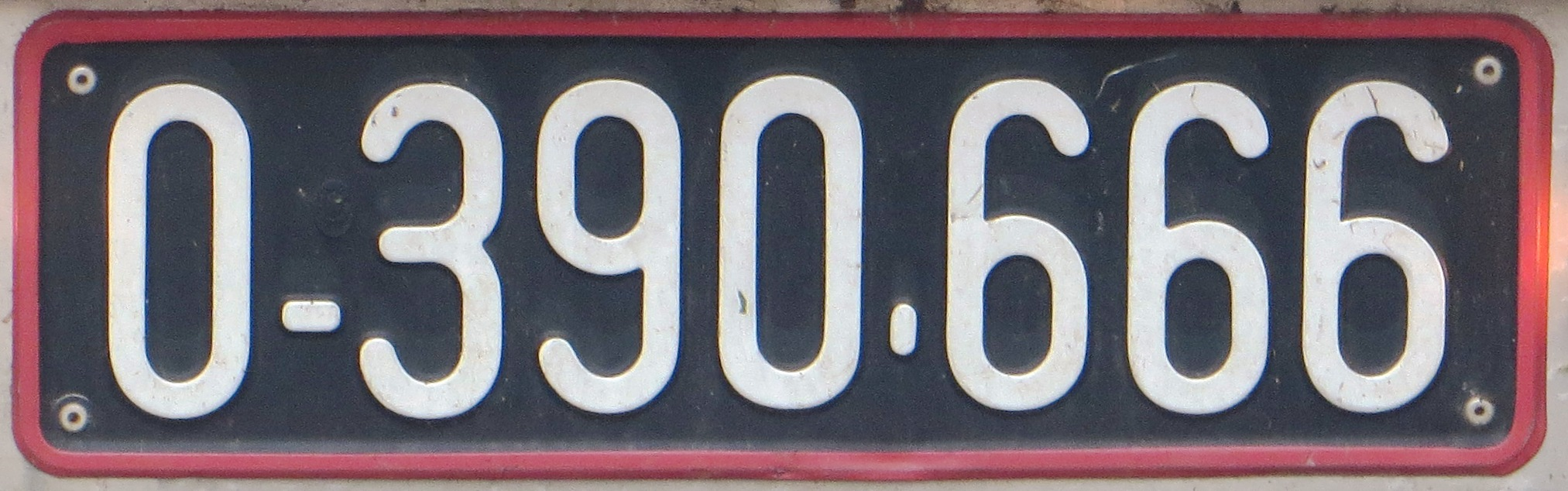 Oud Oostenrijks kentekenplaat